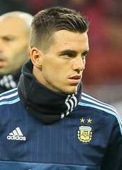 Месси и Ко обыграли сборную России